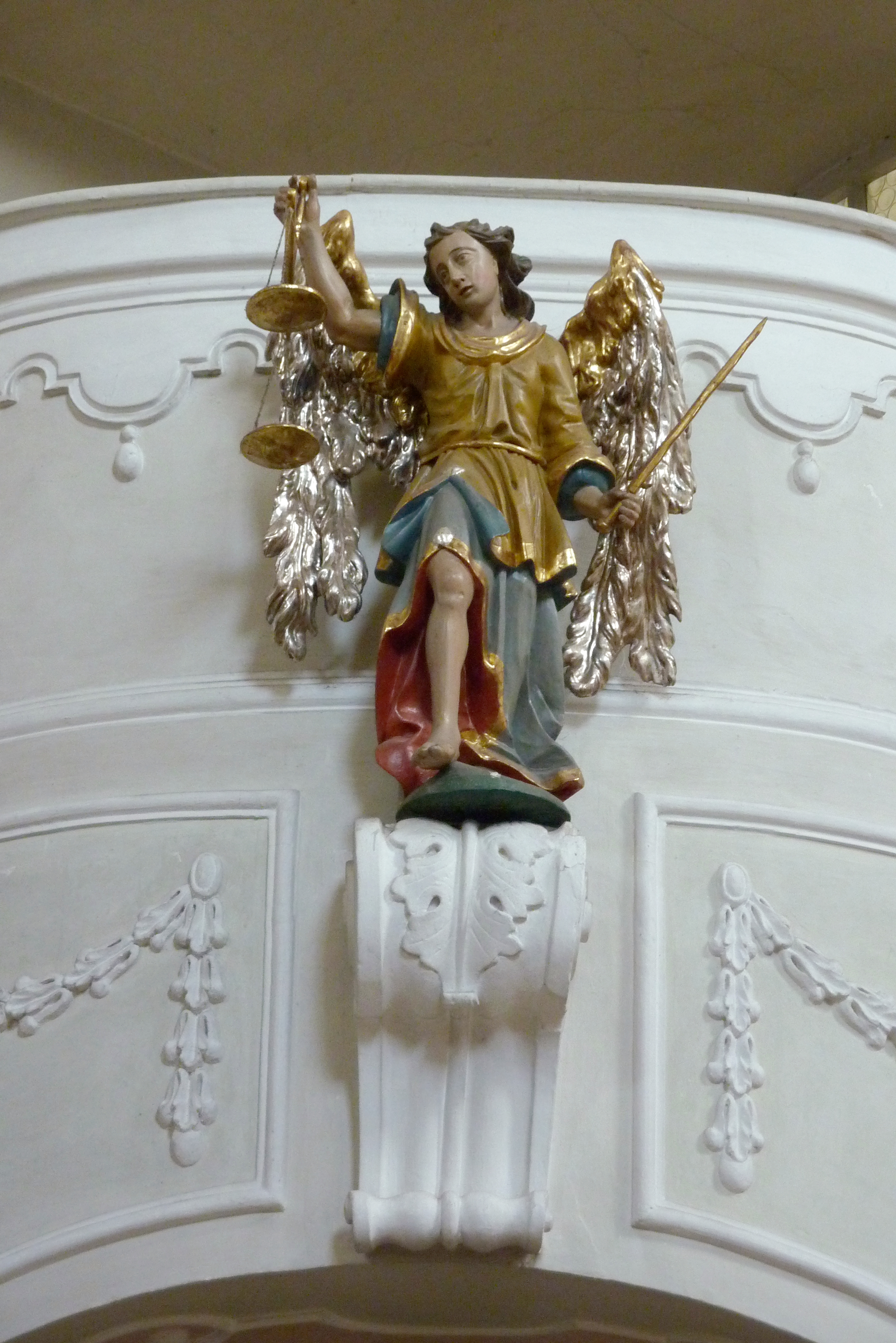 Wallfahrtskirche Mariä Heimsuchung (Zu Unserer lieben Frau vom Roggenacker) in Flochberg, einem Stadtteil von Bopfingen im Ostalbkreis (Baden-Württemberg), Skulptur des Erzengels Michael